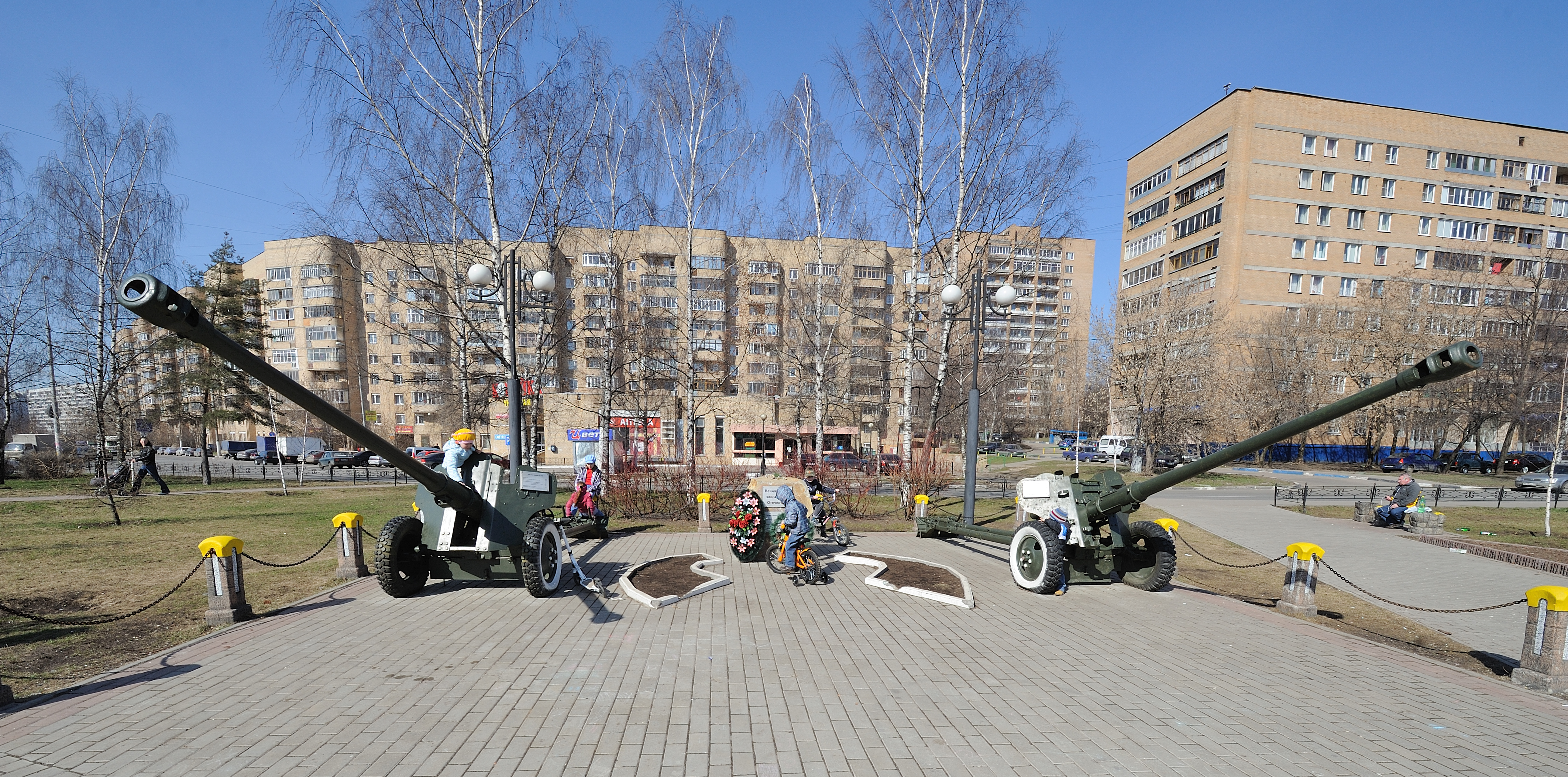 Карельский бульвар мемориал